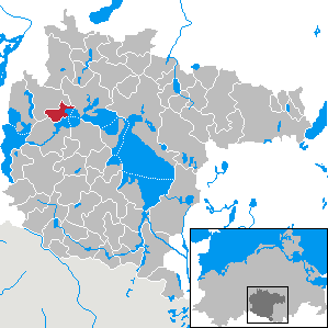 Silz im Landkreis Müritz, Mecklenburg-Vorpommern